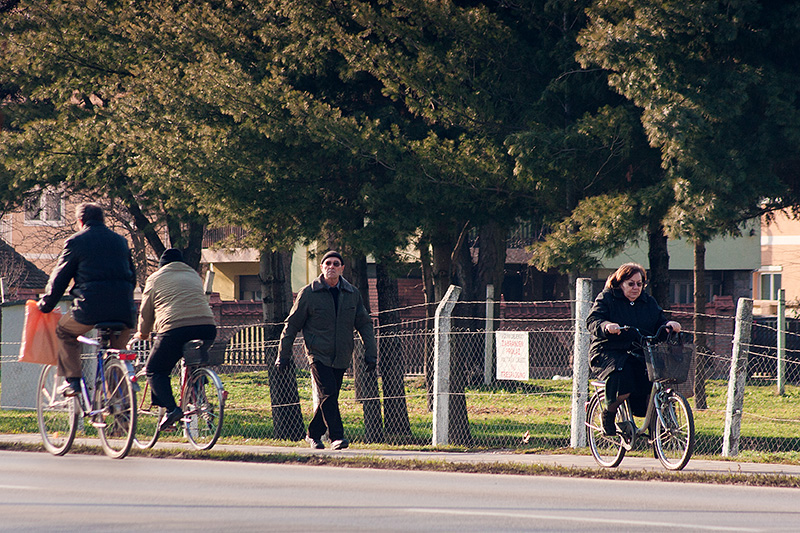 Бициклистичка стаза у Поцерској улици